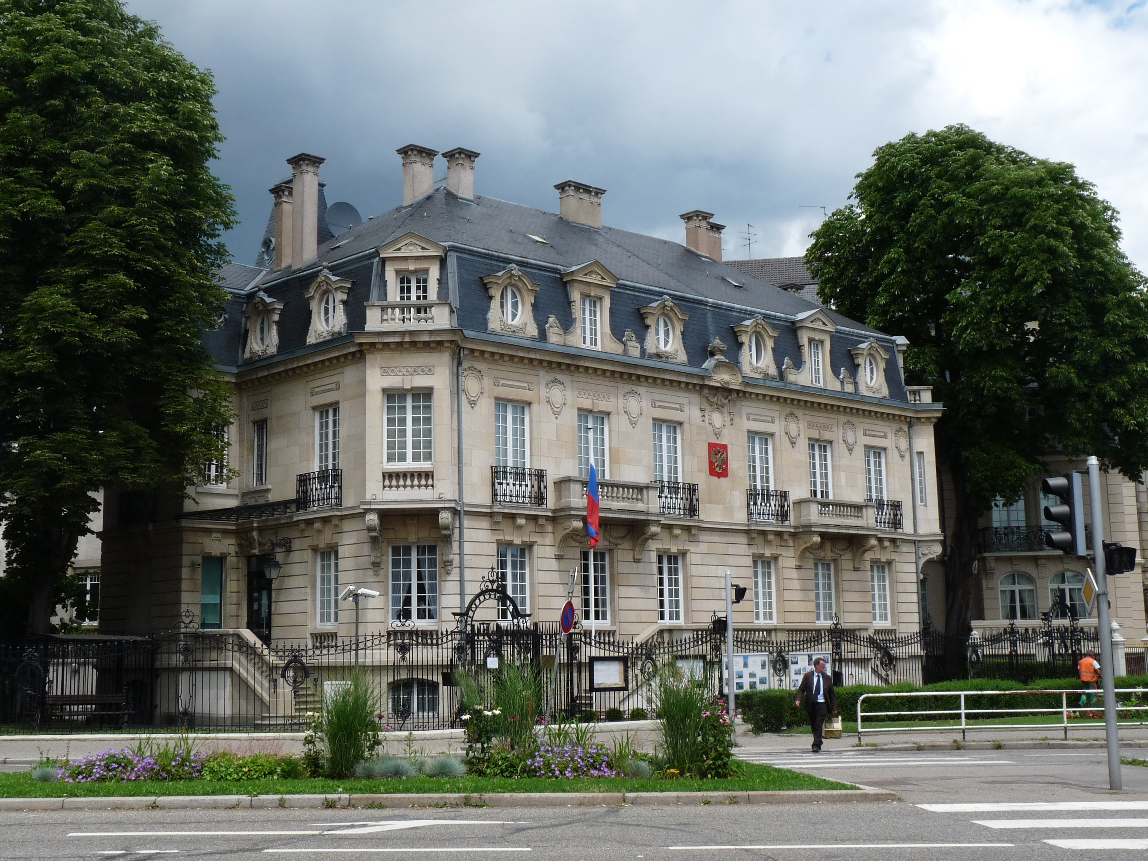 Strasbourg : Consulat général de la Fédération de Russie, 6 place Sébastien Brant. Construit en 1904 par Armand Richshoffer (1859-1937).